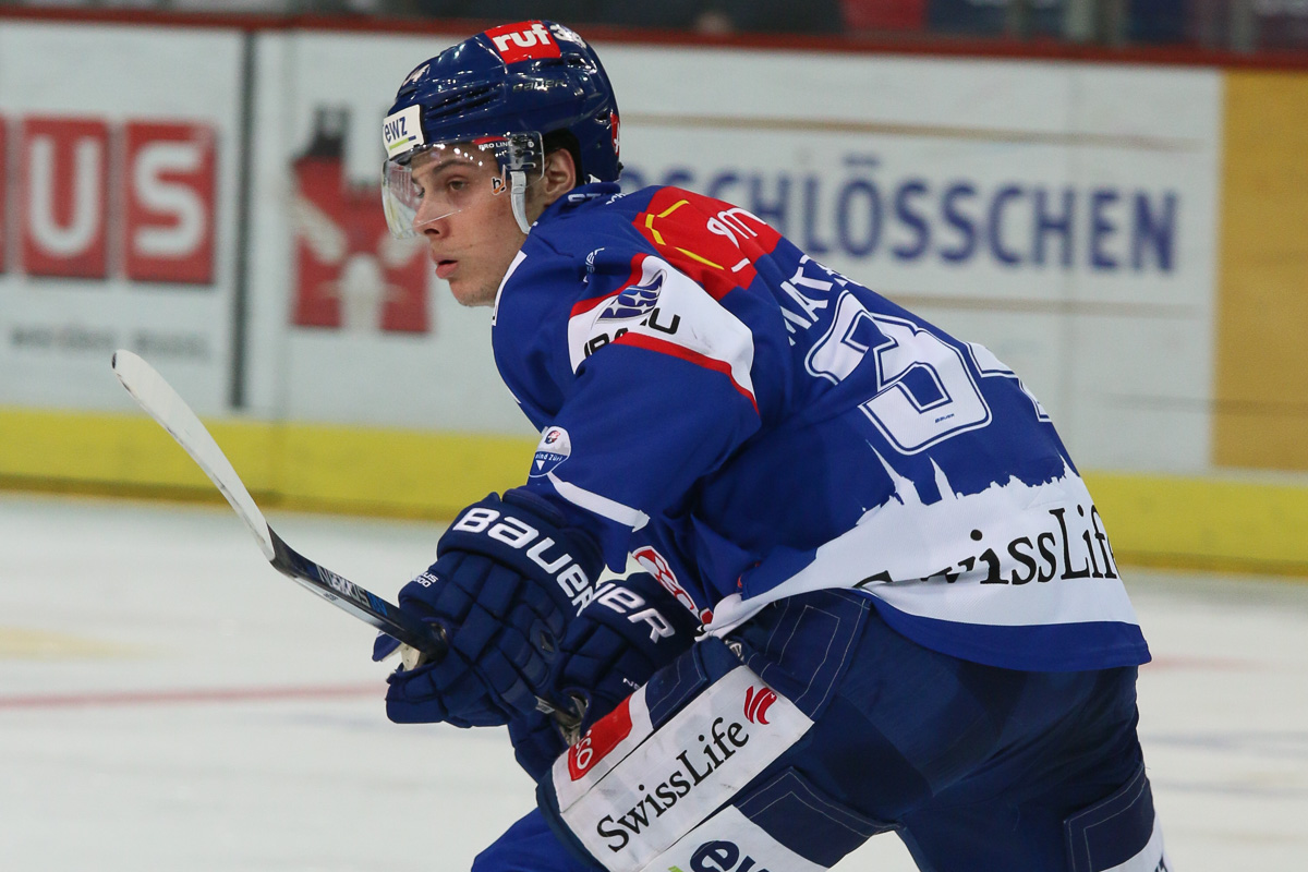 Auston Matthews, ZSC Lions - HC Ambrì-Piotta, 17.01.2016